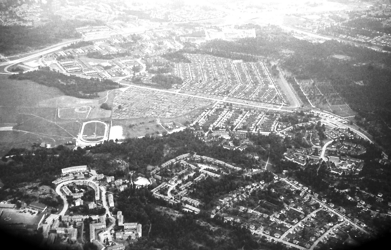 Del av Skarpnäck från luften, Bagarmossen med Riksrådsvägen i mitte.